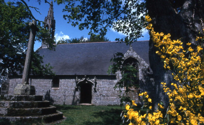 La Chapelle de Trémalo, où est exposé le Christ Jaune qui a inspiré Paul Gauguin pour l'une des ses œuvres.